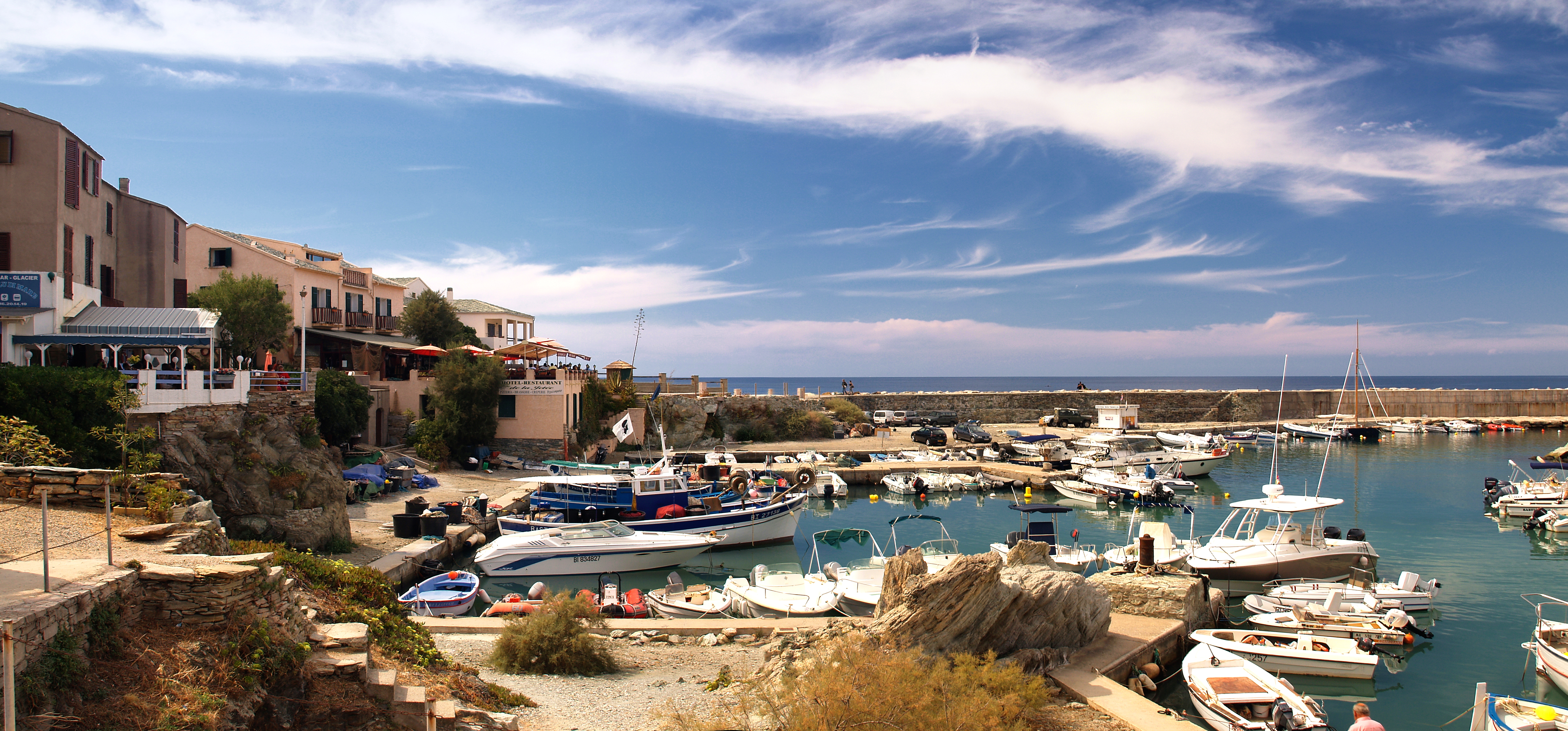 Centuri (Corsica) - Panorama sur le sud du port